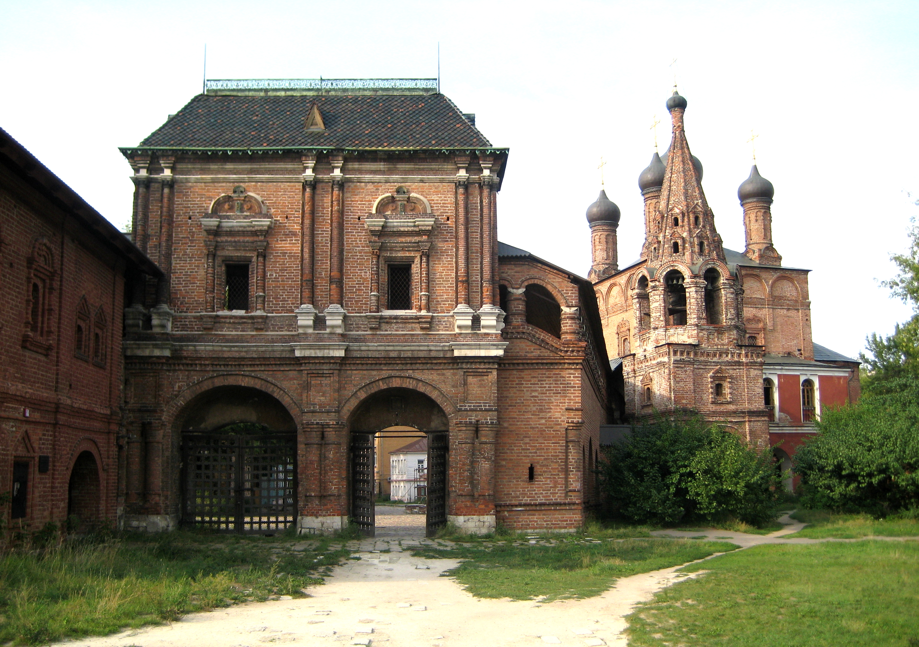 Крутицкое подворье